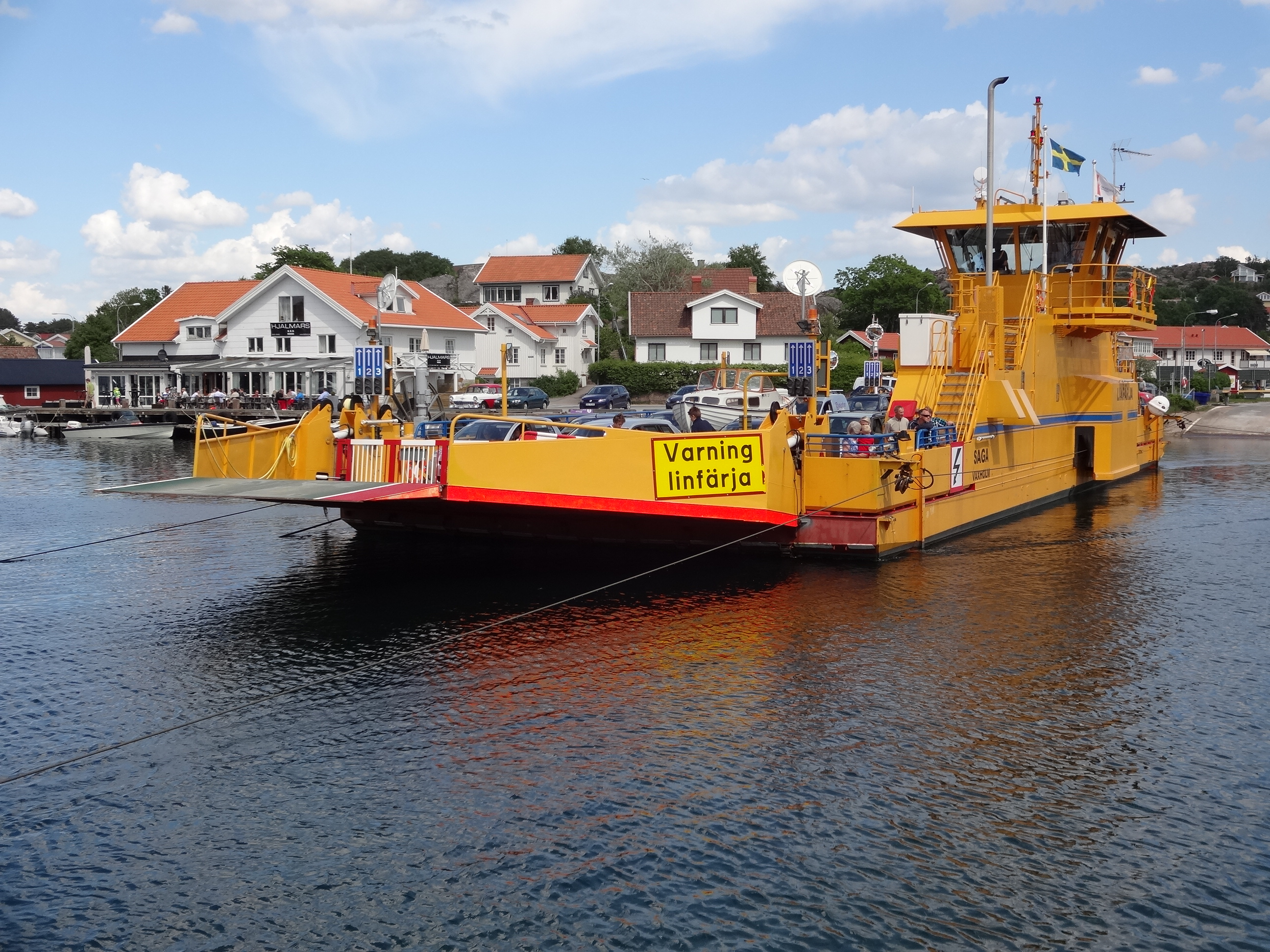 Linfärjan Saga, som trafikerar Hamburgsundslinjen i Bohuslän